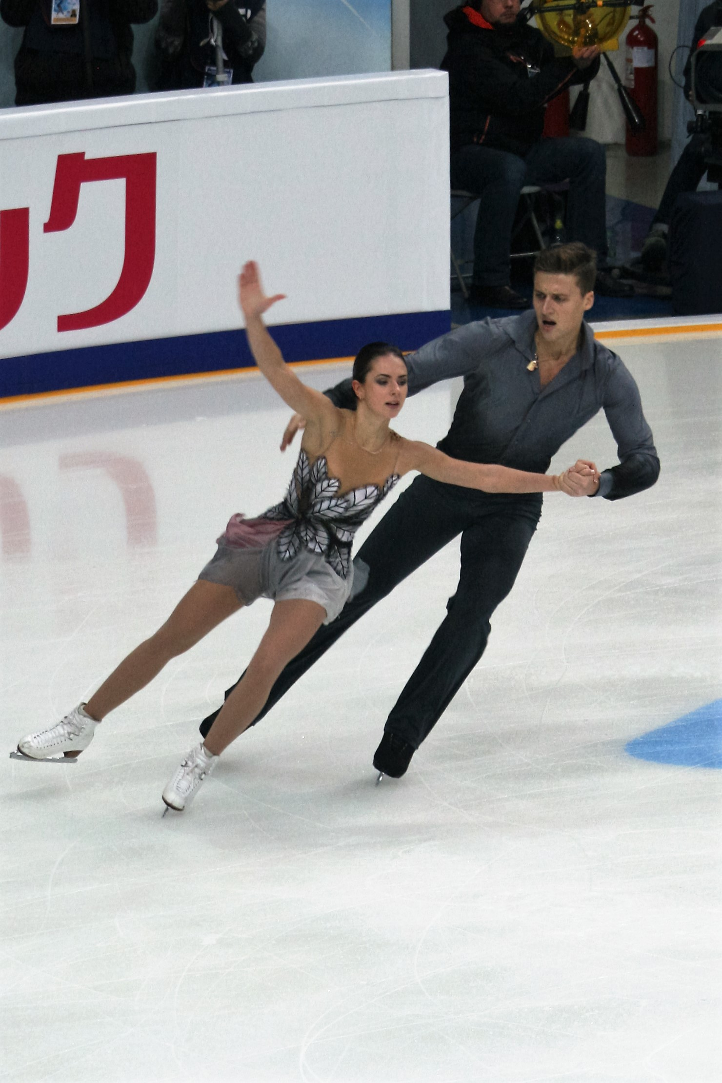 Наталья Забияко / Александр Энберт (Россия) на Кубке Ростелекома 2016.